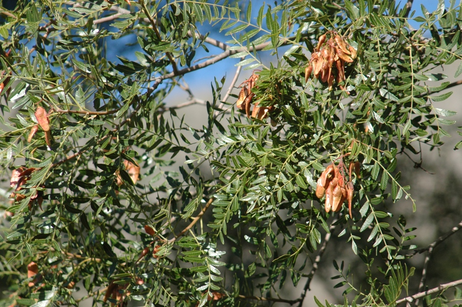 Detalle de las hojas y de las sámaras (semillas) del quebracho colorado serrano u orco-quebracho (Schinopsis marginata = haenqueana). Córdoba, Argentina.